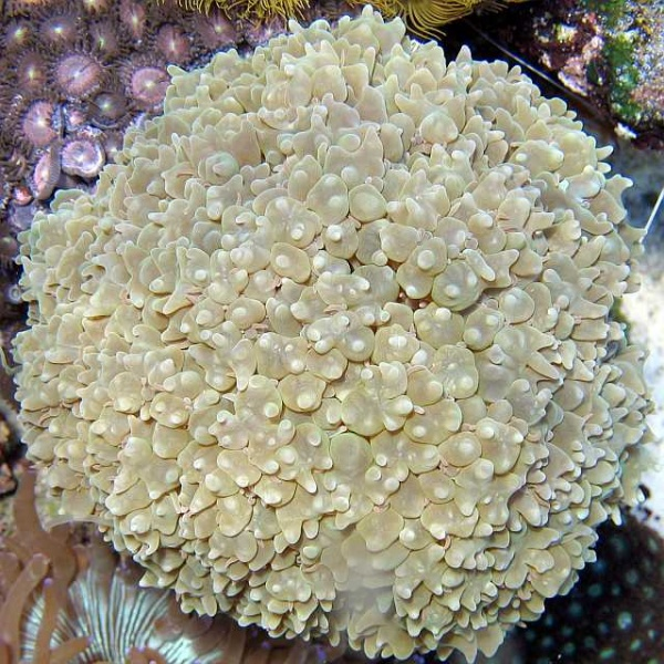 Physogyra Lichtensteini en acuario de arrecife